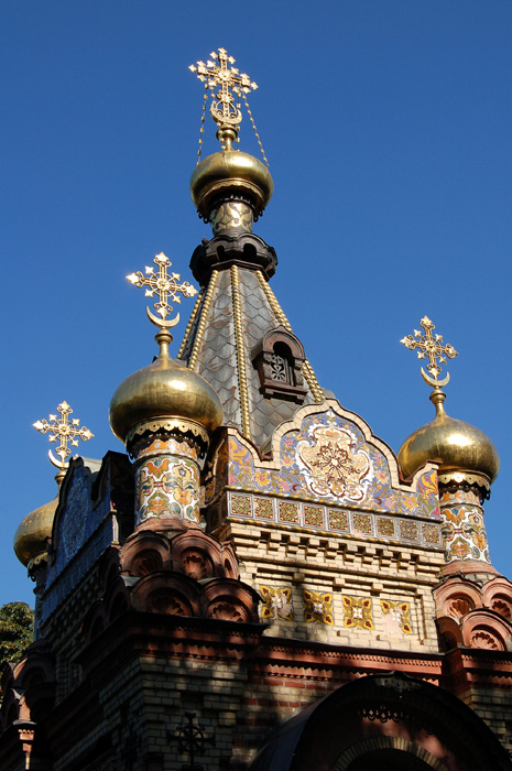 Беларуская (тарашкевіца): Палацава-паркавы ансамбаль: палац, дэкаратыўнае аздабленьне інтэр’ера вежы і цэнтральнай залі палаца, Пятрапаўлаўскі сабор, капліца-пахавальня,парк. г. Гомель This is a photo of Belarusian heritage monument. Reference number: 310Г000044 ( WLM)